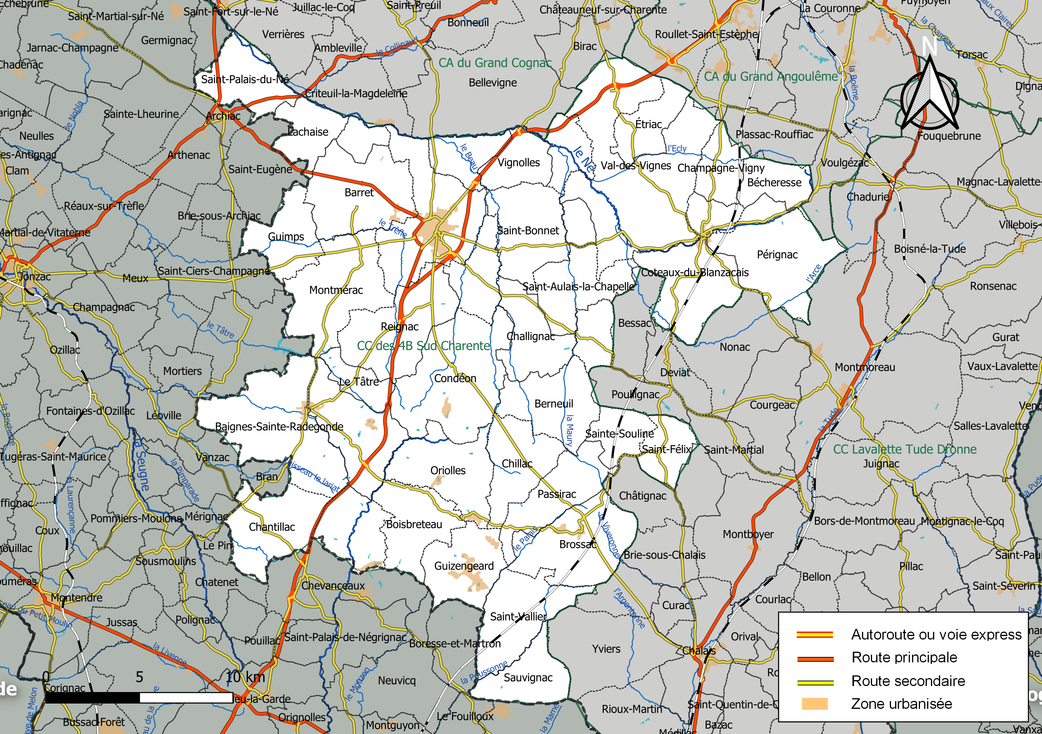 Carte géographique de la Communauté de communes des 4B Sud-Charente, département de Maine-et-Loir, France. Composition au 1er janvier 2019.